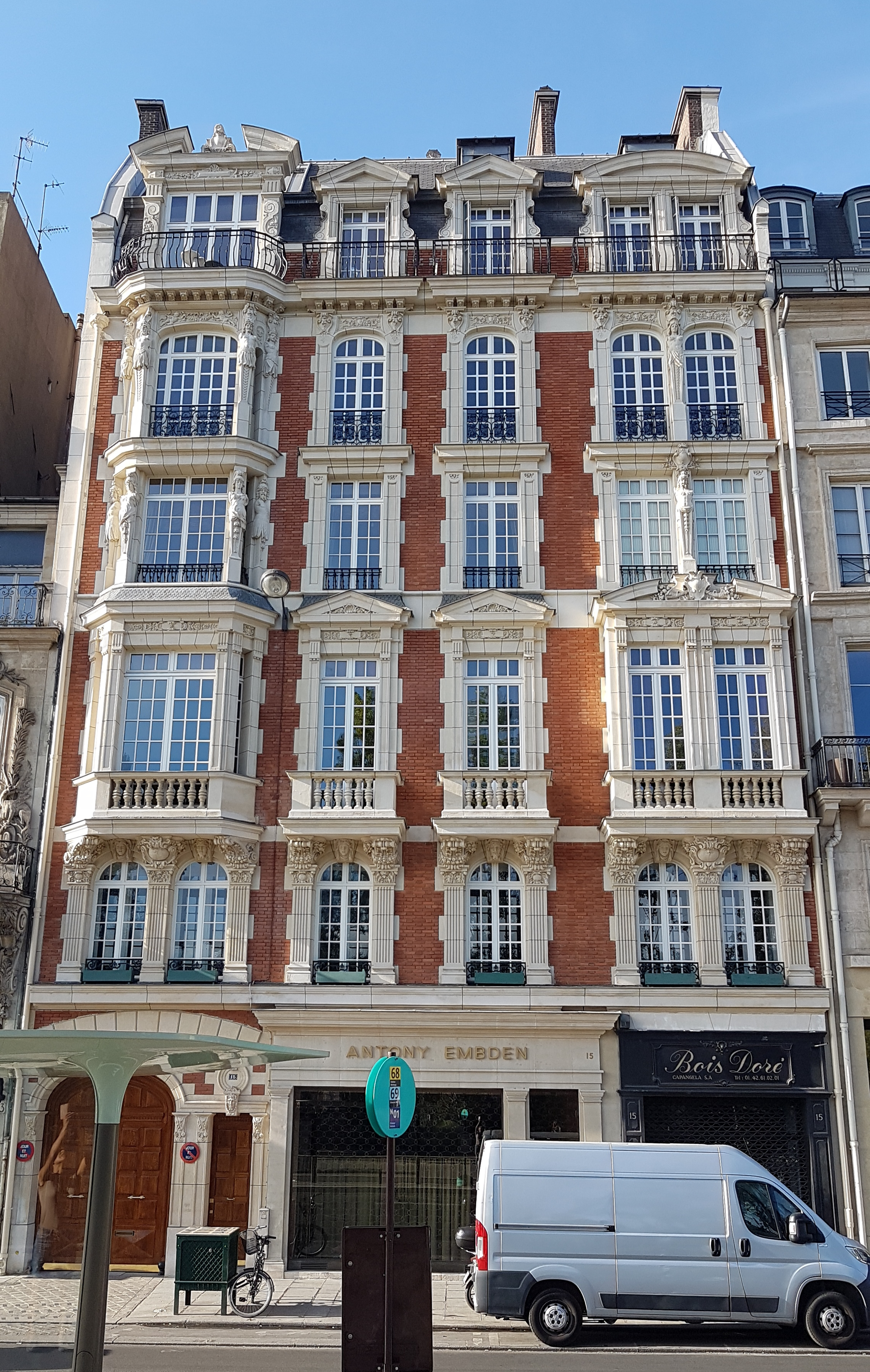 Historistisches Gebäude in Paris-7. Arrondissement